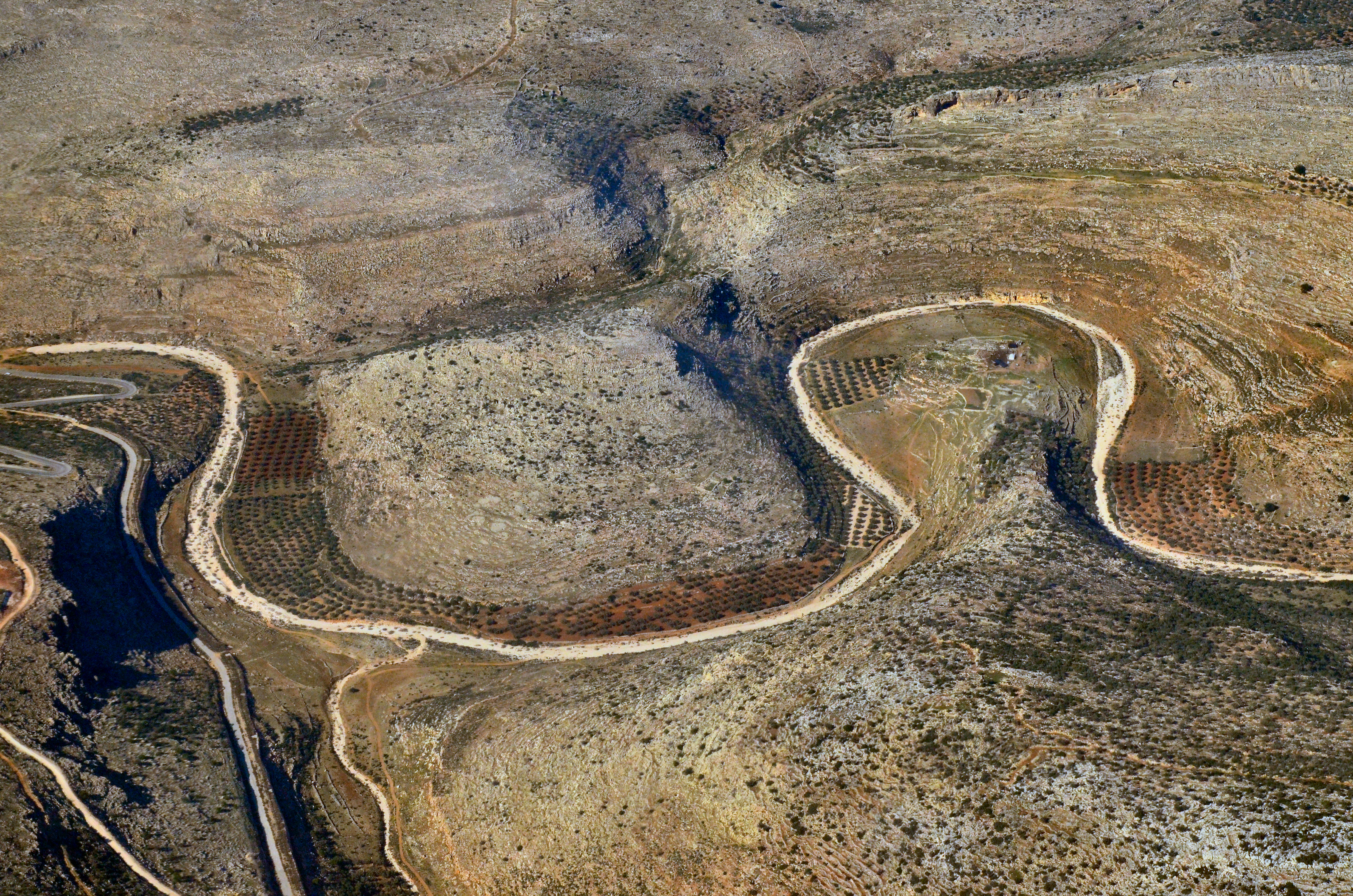 "הפרסה" בנחל שילה וצרדה המקראית